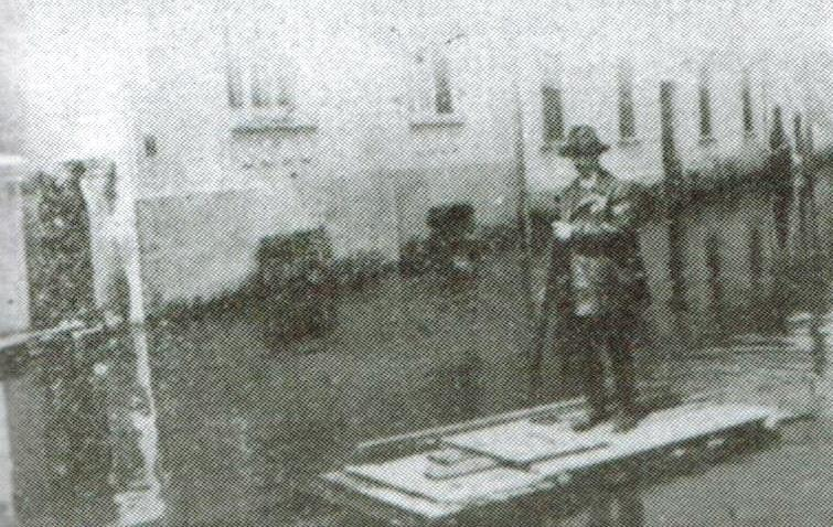 השכונה היהודית יאלייה מוצפת במי הדנובה